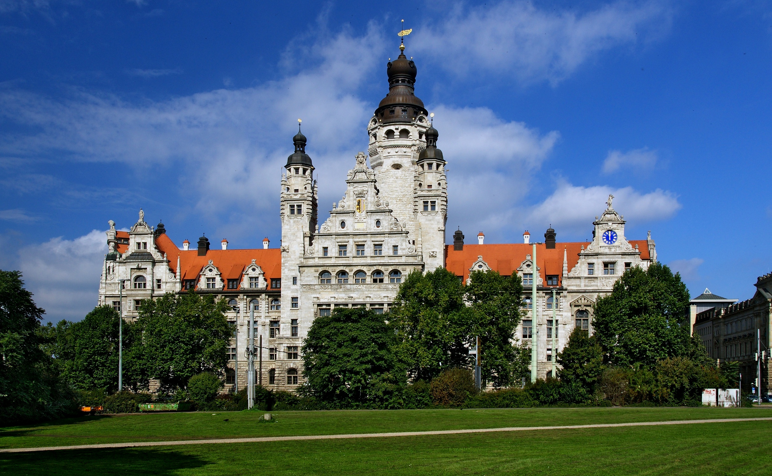 Das Neue Rathaus in Leipzig, 2010. Architekt: Hugo Licht